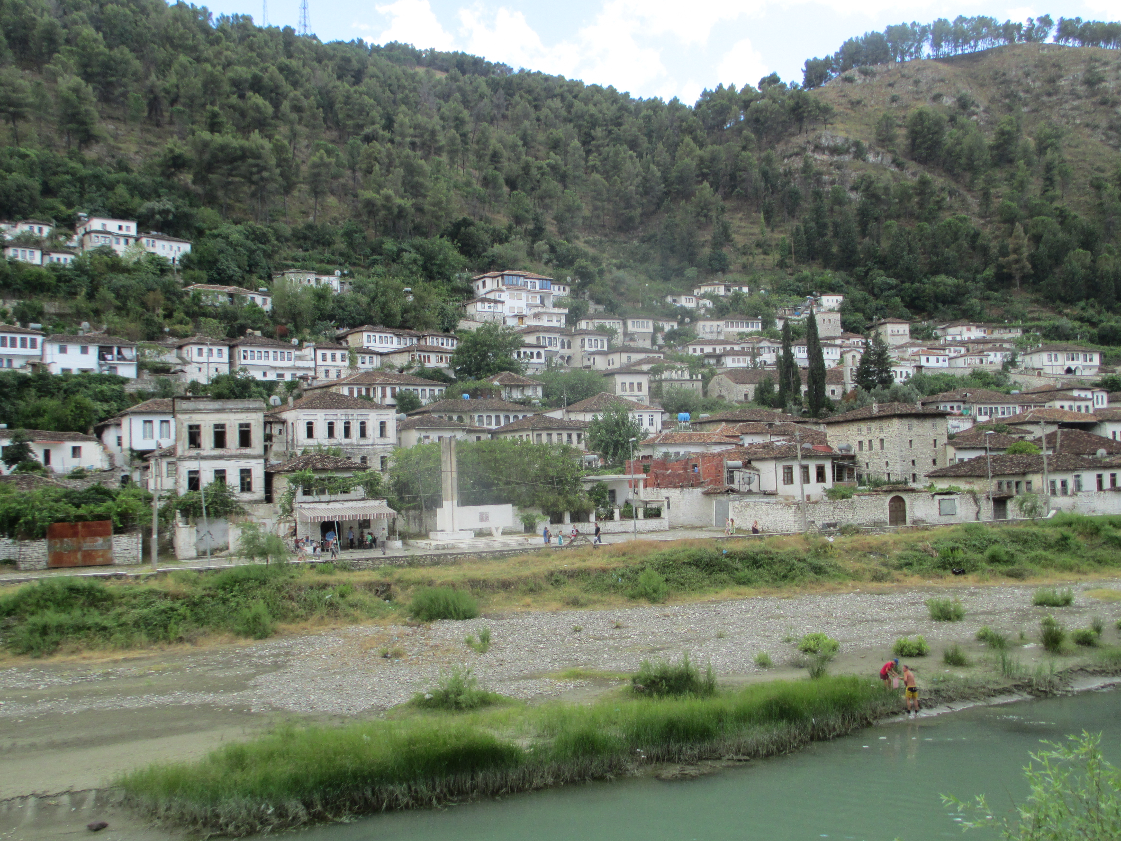 רובע גוריצה בבראט